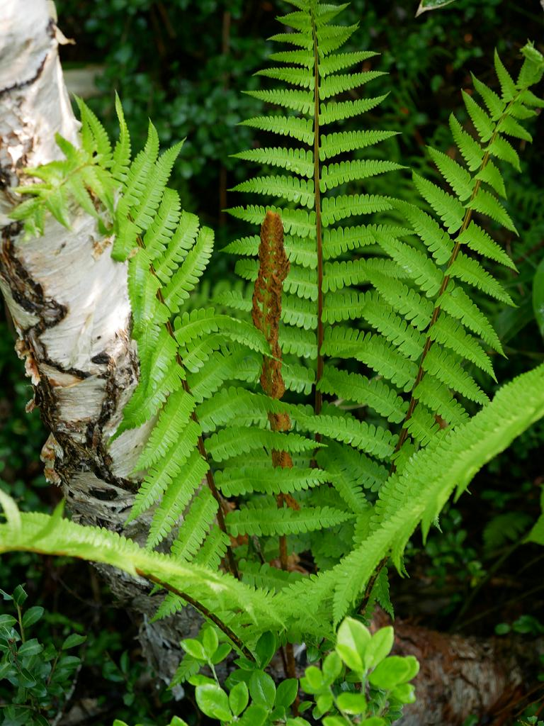 2019/06/20 群馬県：Gunma Pref. Japan